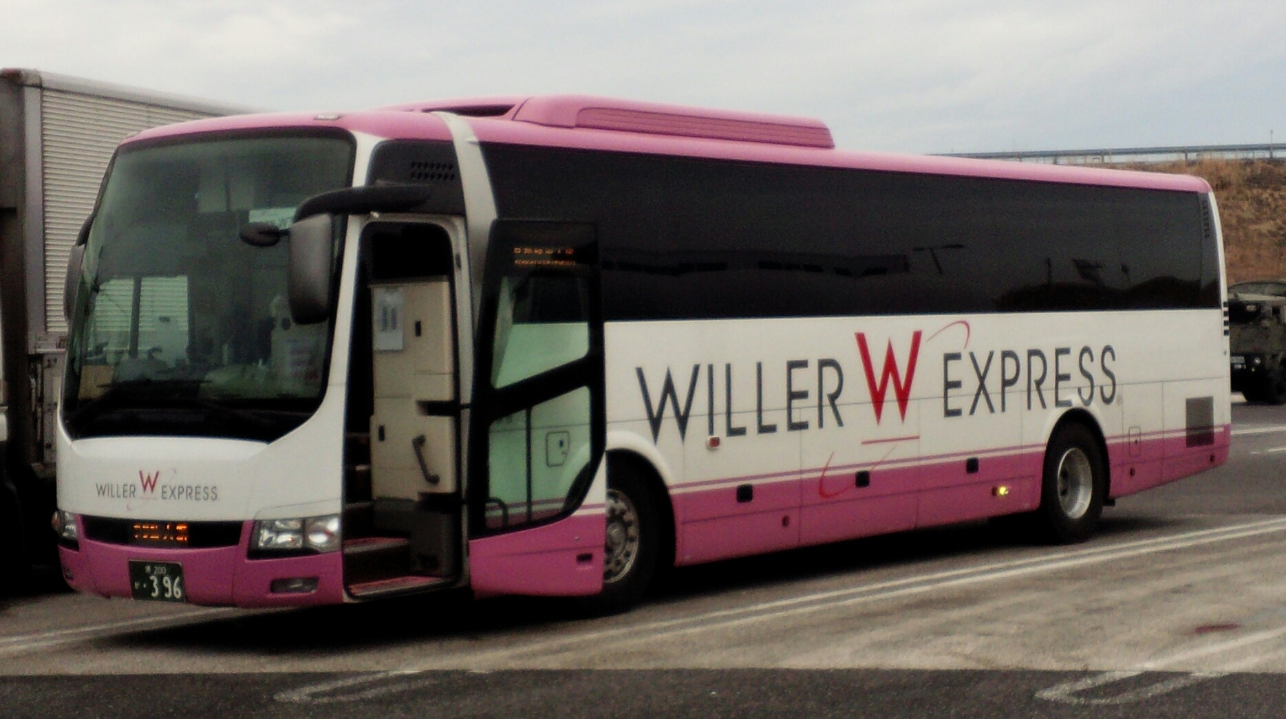 ウィラーエクスプレスの三菱エアロエース（大阪 - 名古屋 線）